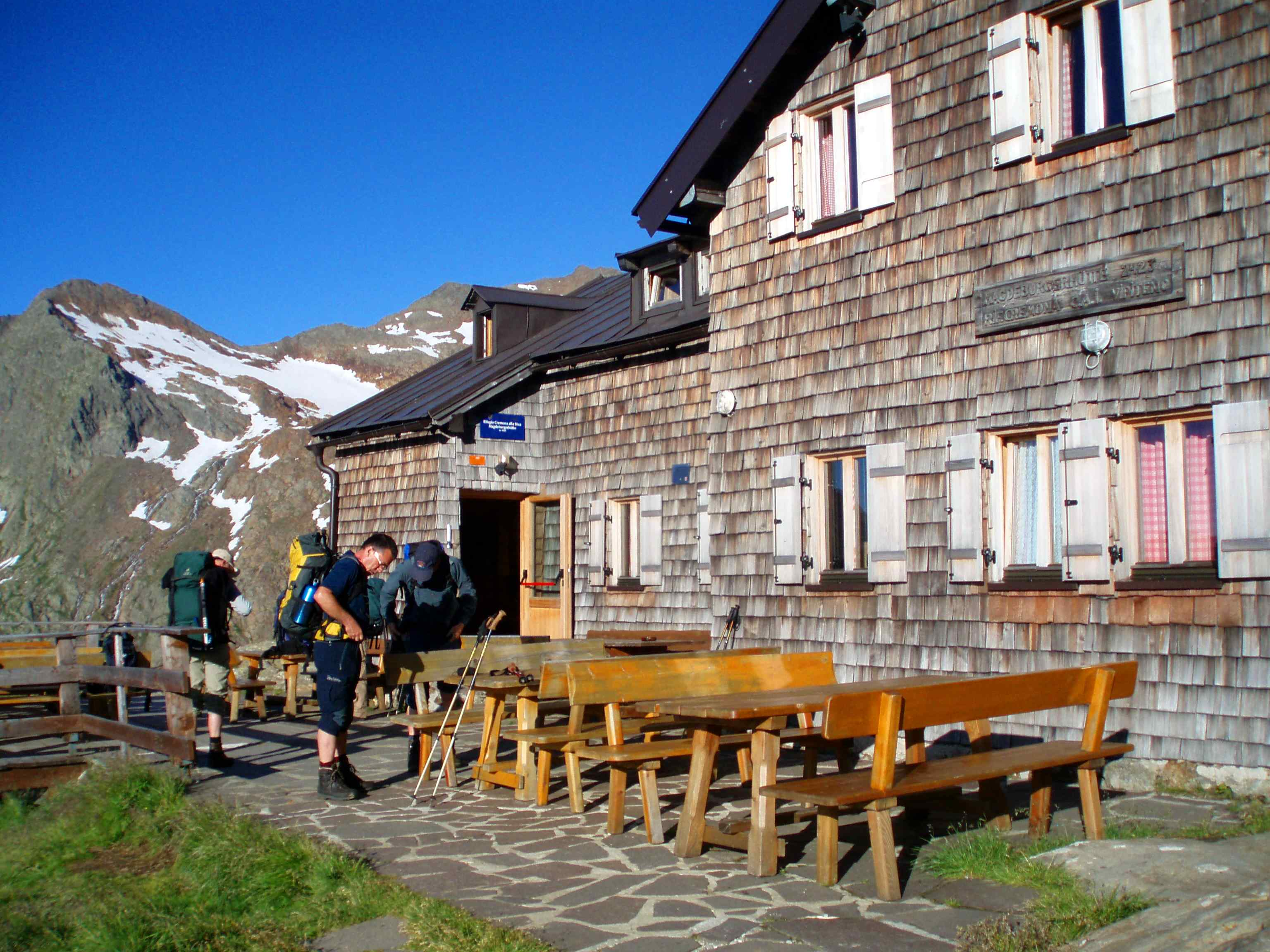 Morgens vor der Magdeburger Hütte